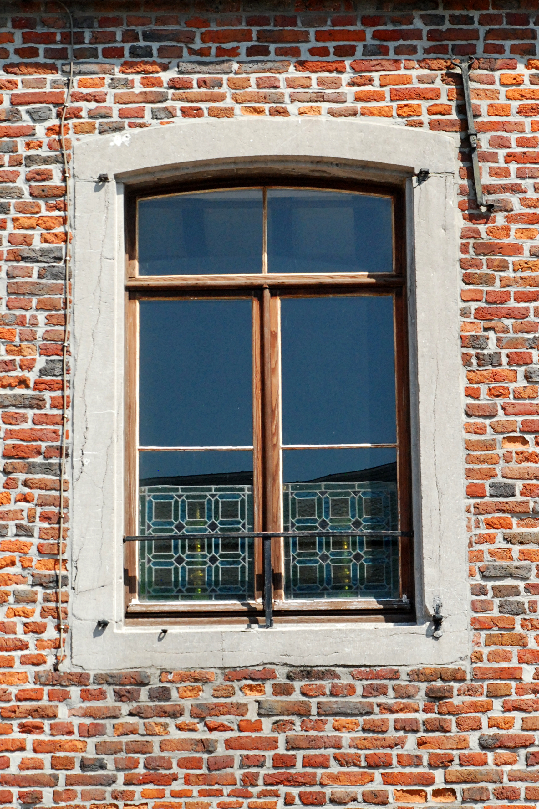 Belgique - Brabant wallon - Genappe - Auberge du Roy d'Espagne